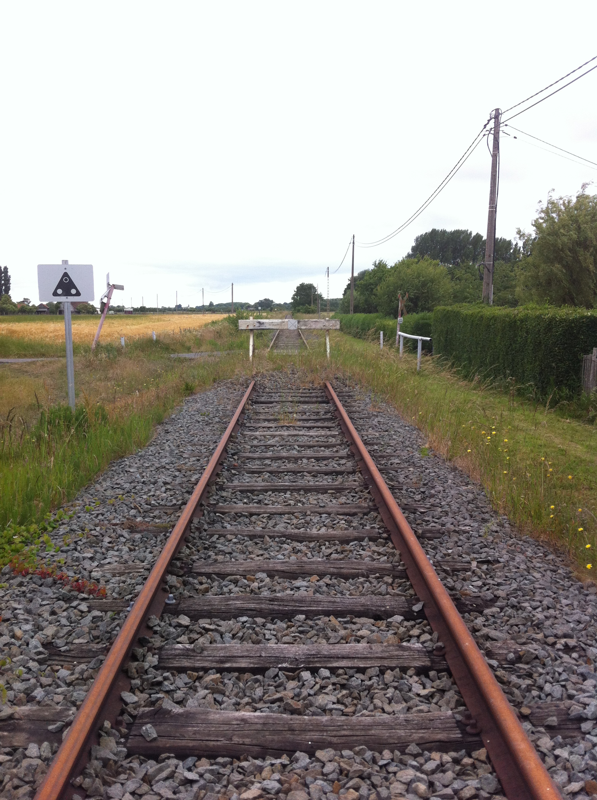 Butoir au niveau du point kilométrique 87,4 de la ligne 73 d'Infrabel en direction de la France